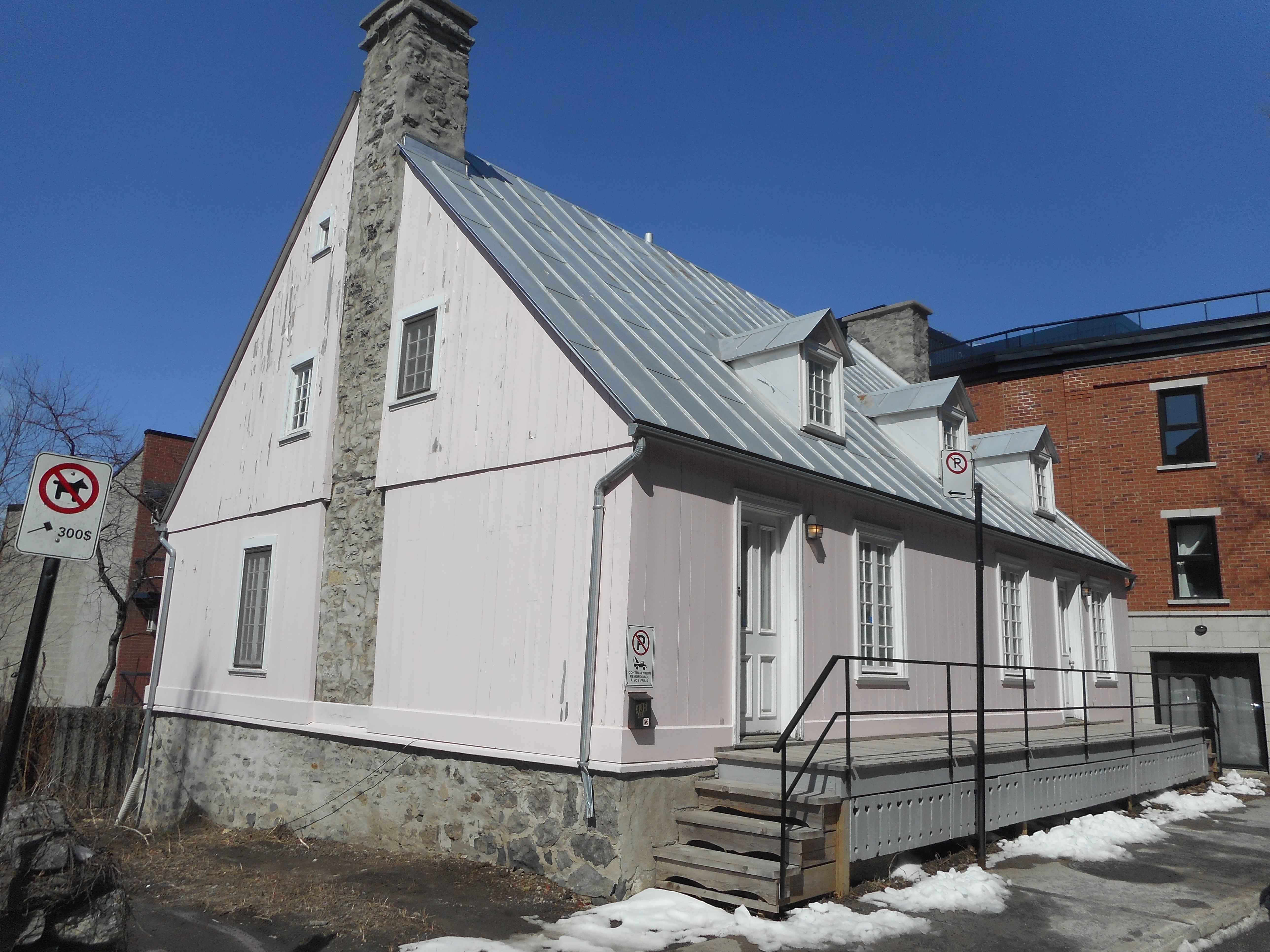 Maison Brossard-Gauvin, 433-435, rue Saint-Louis, Montréal Grand répertoire du patrimoine bâti de Montréal